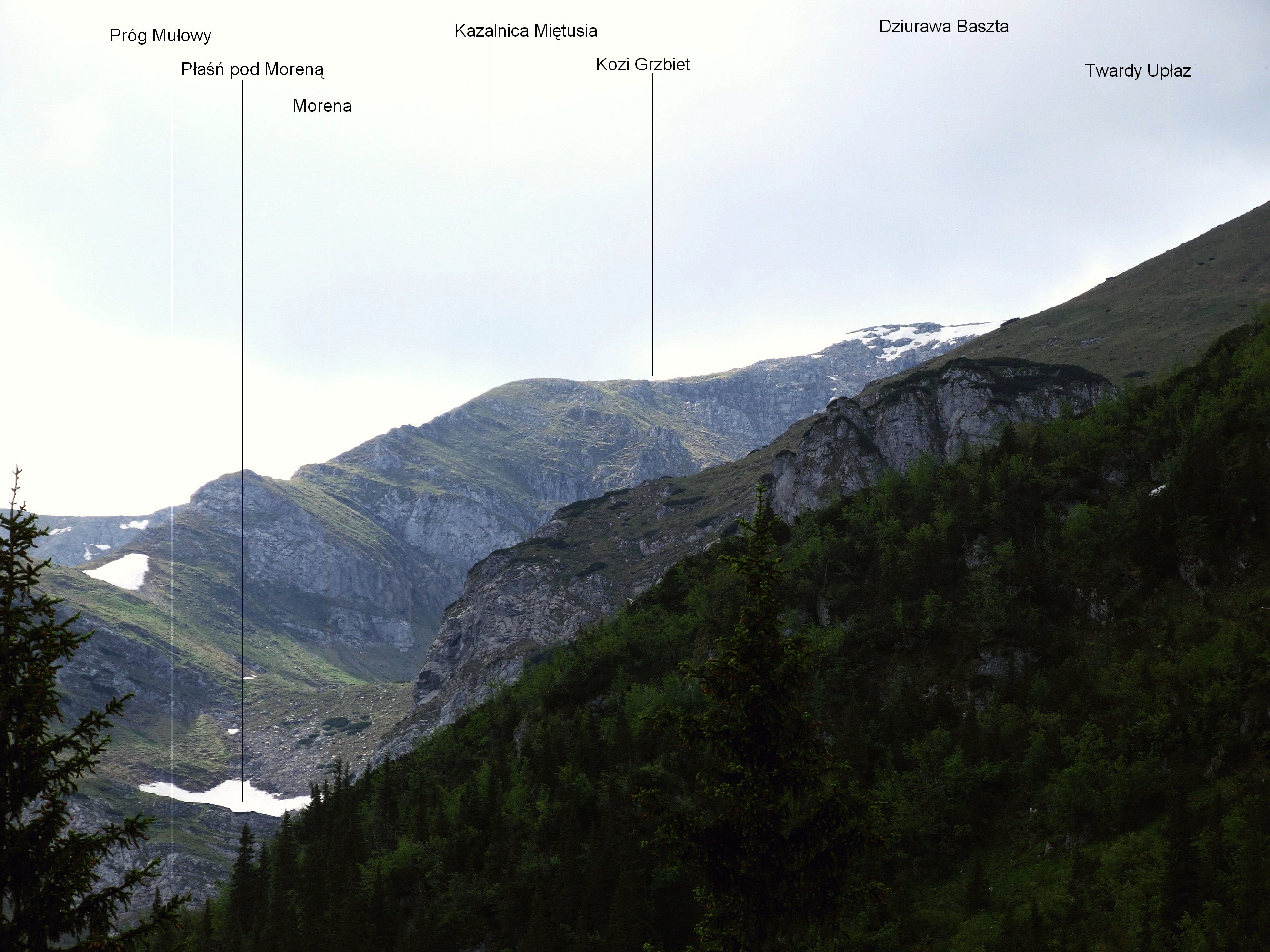 Widok z okolic Pieca (na połnocno-zachodnim grzbiecie Ciemniaka)